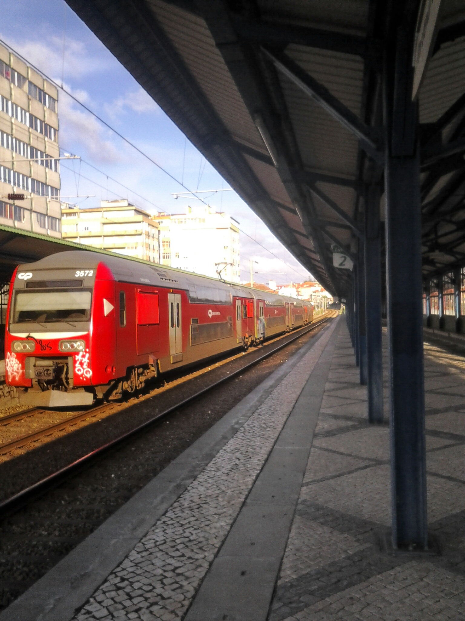 Sintra urban train